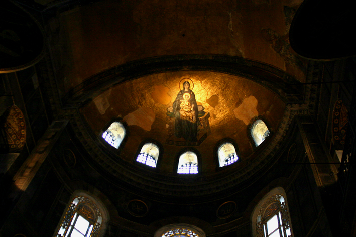 アヤソフィアのアプスにある聖母子のモザイク画 2005年12月 投稿者撮影